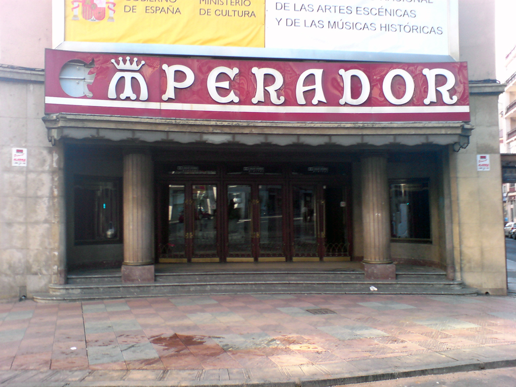 Teatro Emperador